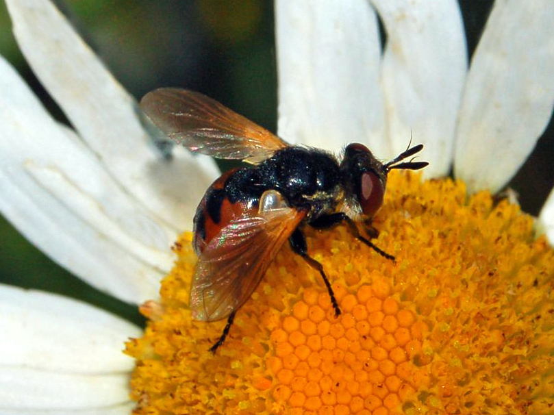 Gymnosoma nudifrons, female. Val Noci, Genova, Italy